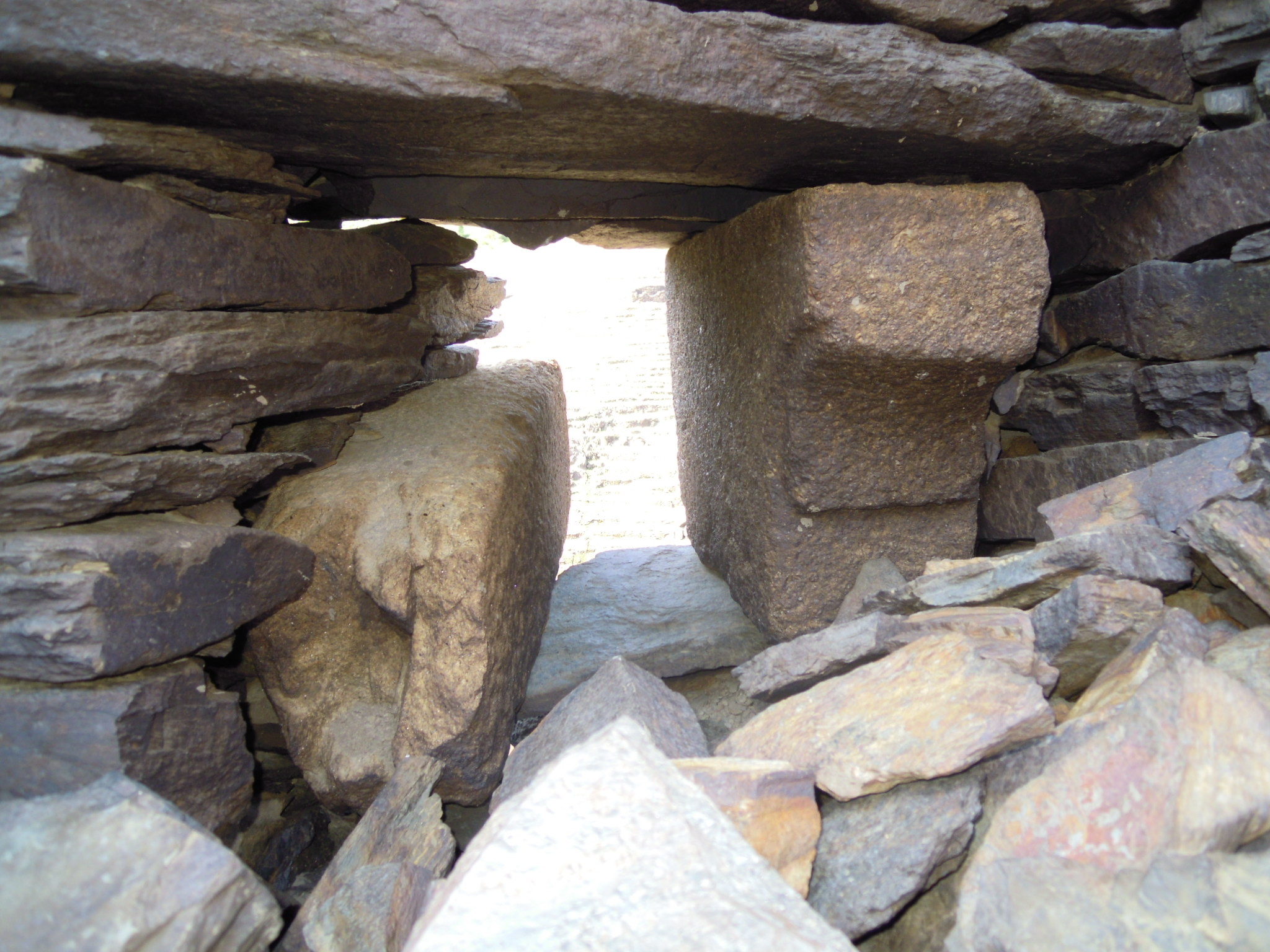 Ventá nun dos edificios de Castro Candaz; A pedra labrada de granito da dereita semella un lintel reutilizado.